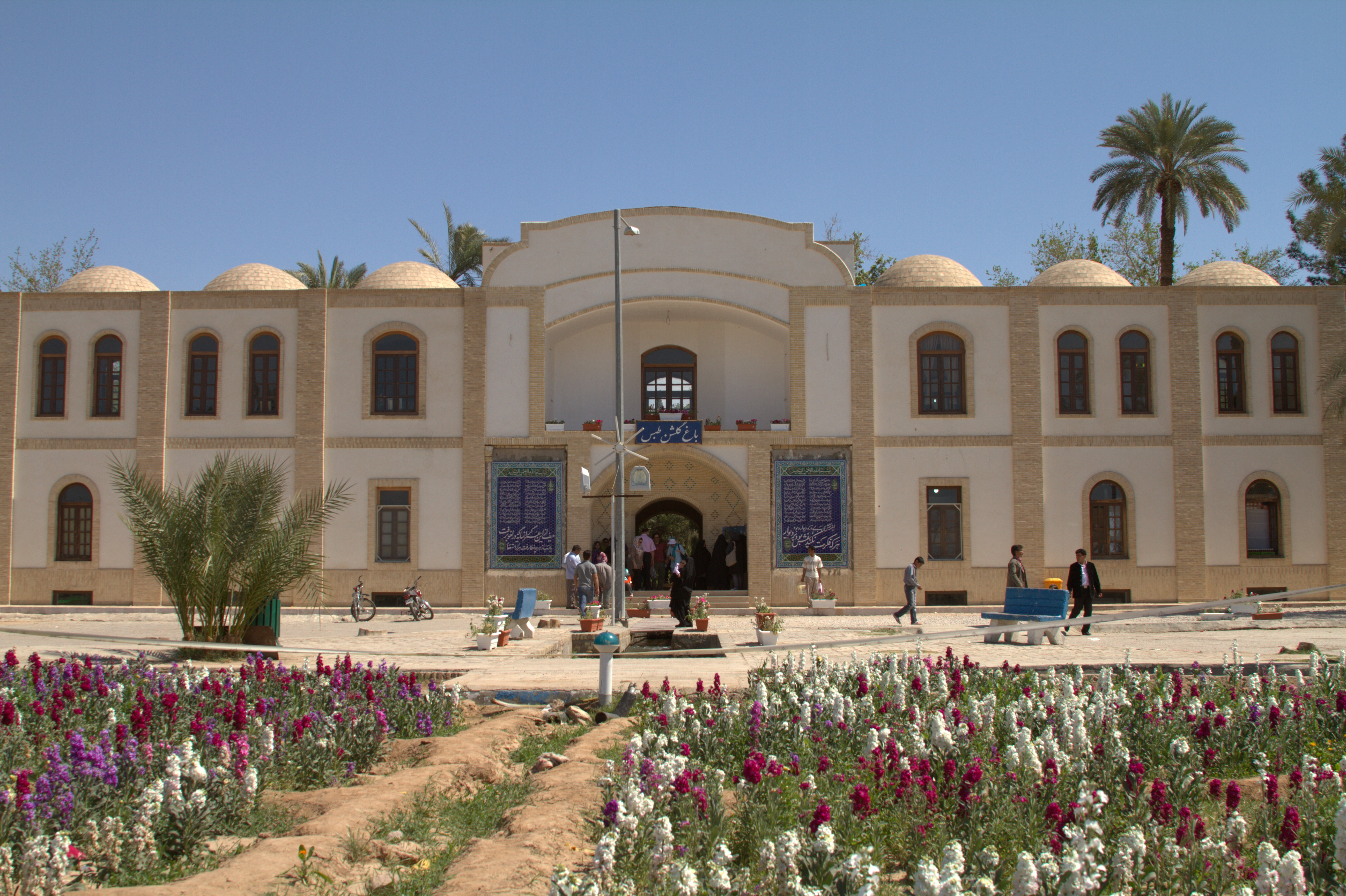 باغ گلشن